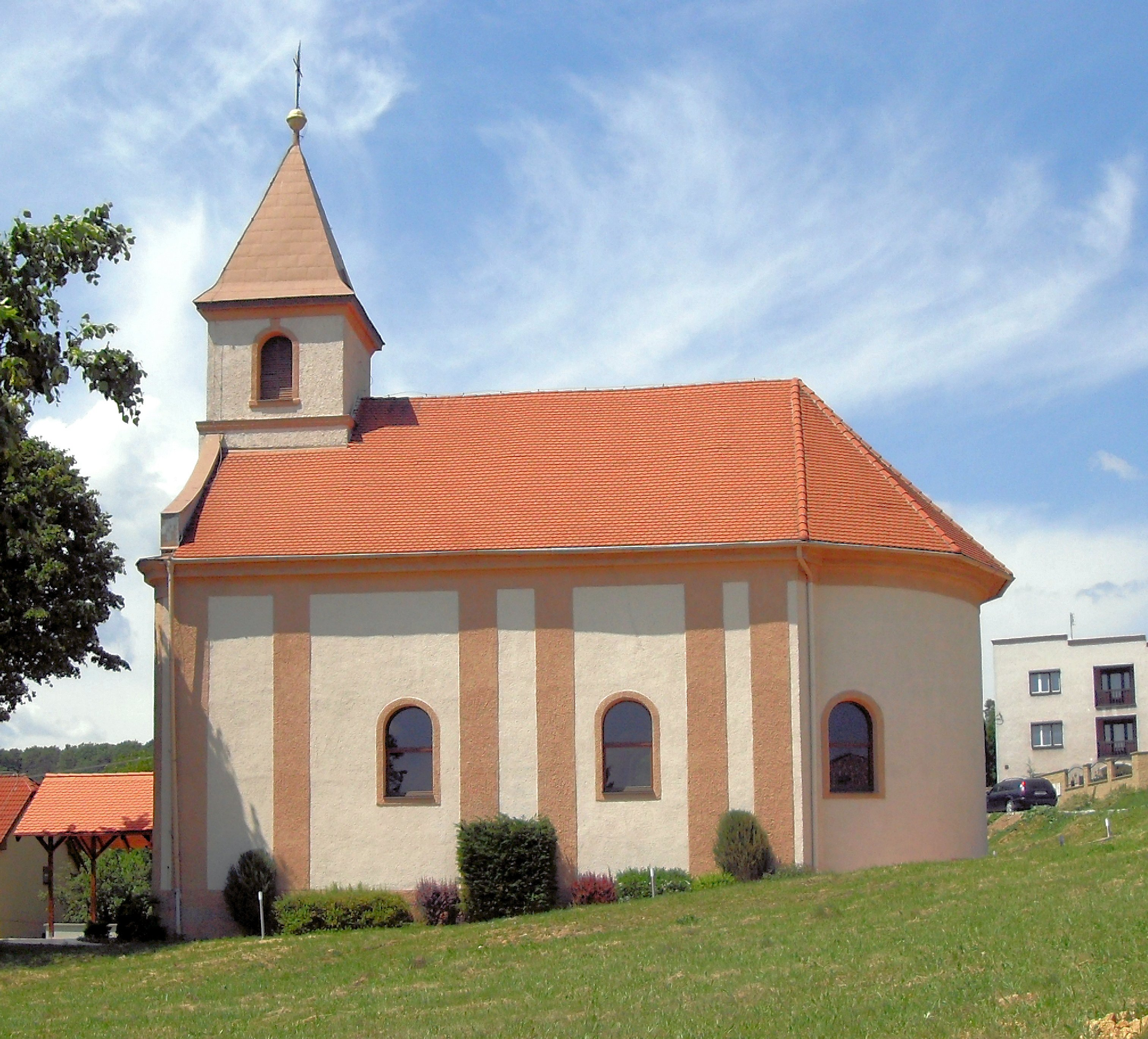 Baška, Rímskokatolícky Kostol svätého Štefana Uhorského